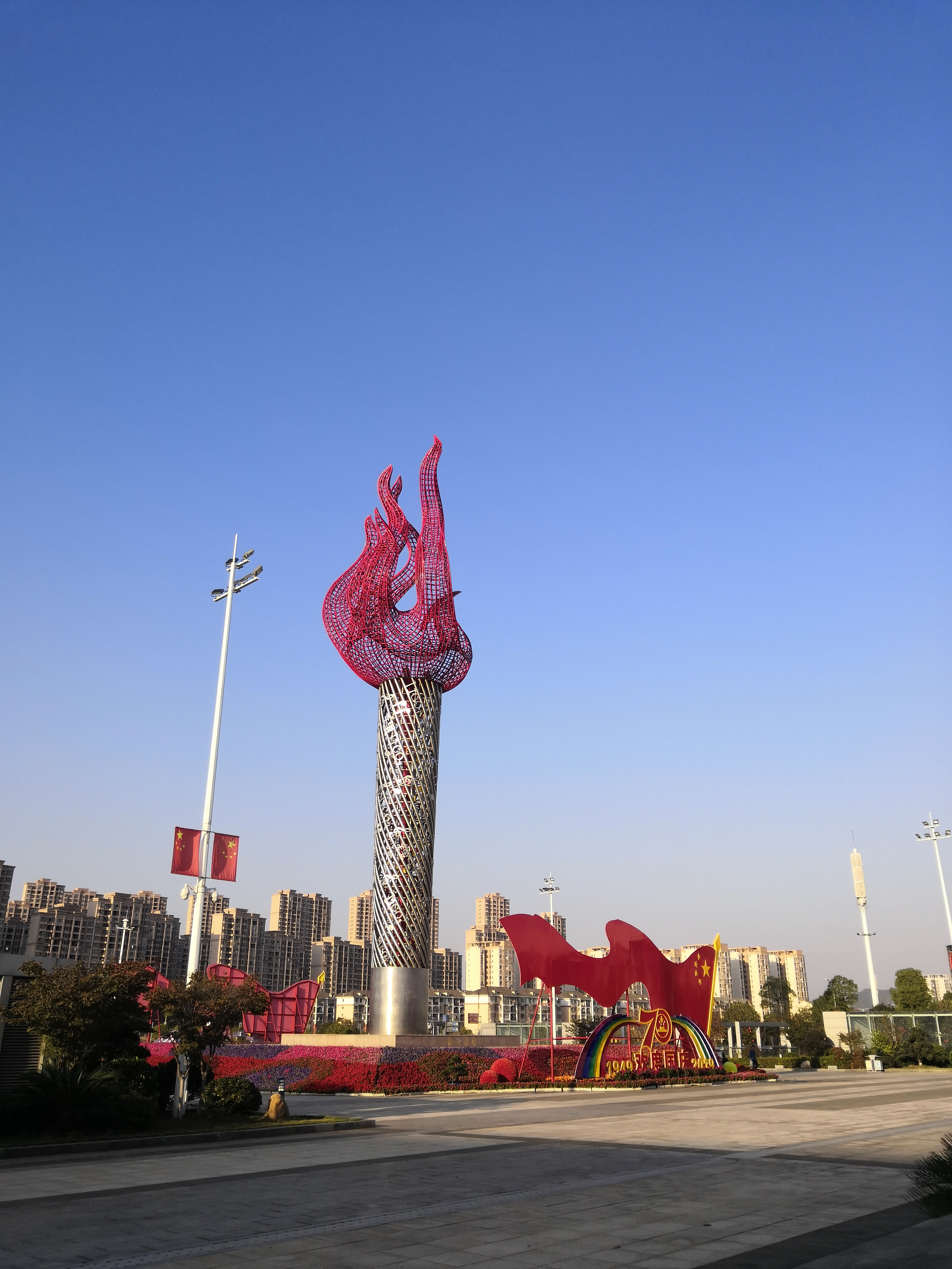 中文（中国大陆）: 宜春火车站 火炬